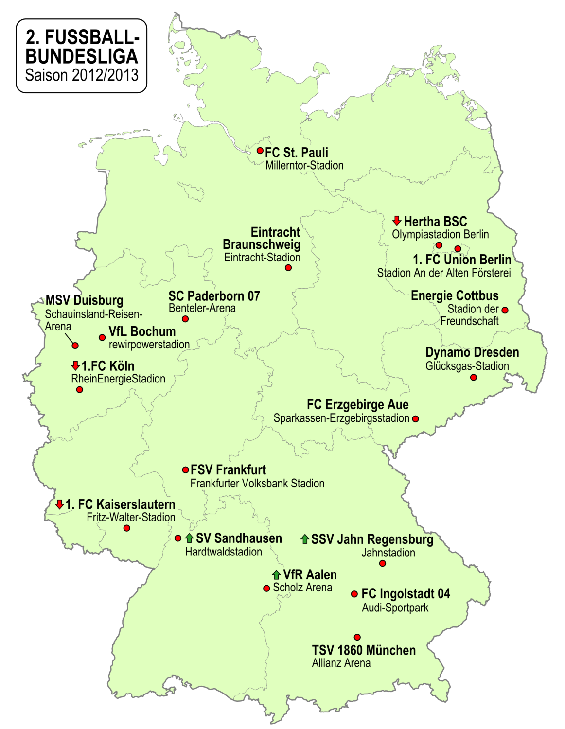 Karte der Vereine der 2. Fußball-Bundesliga-Saison 2012/2013